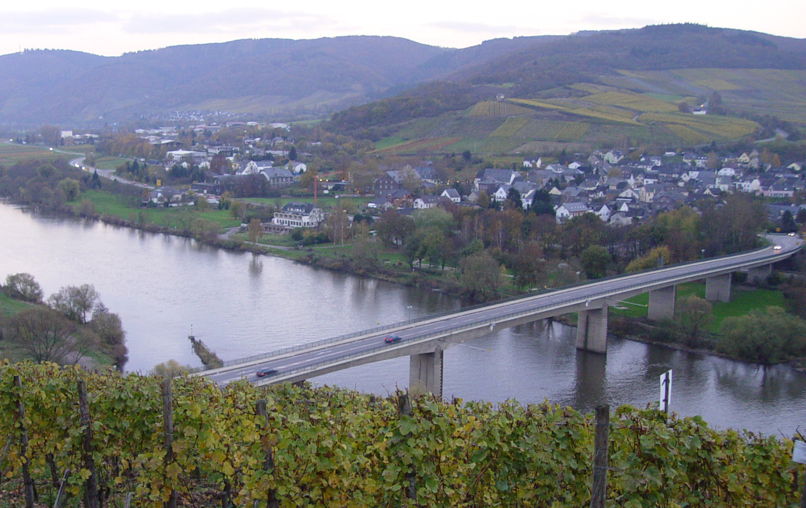 Vue de Mülheim (Rhénanie-Palatinat)